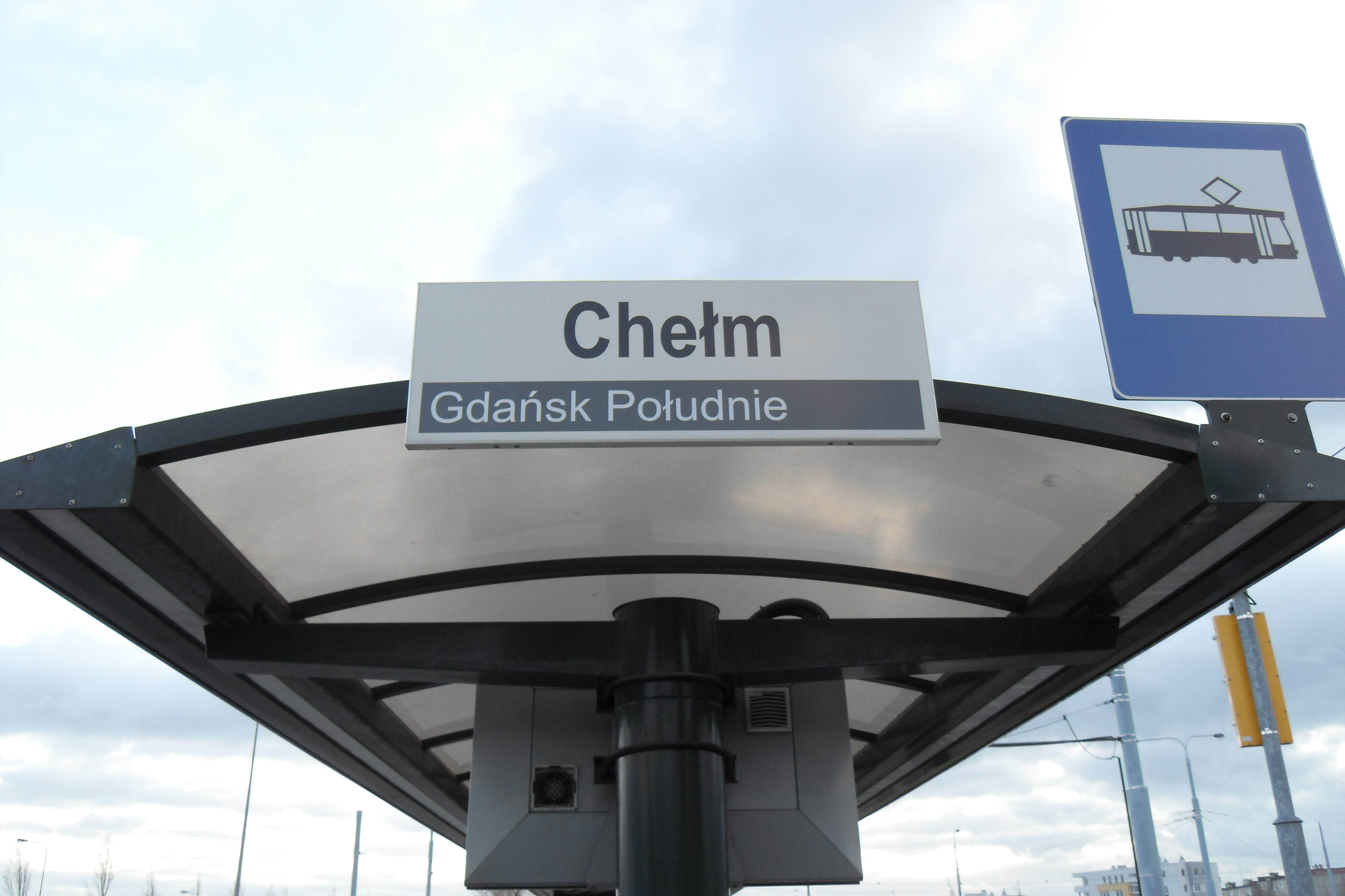 Gdańsk Chełm, tablica przystankowa.